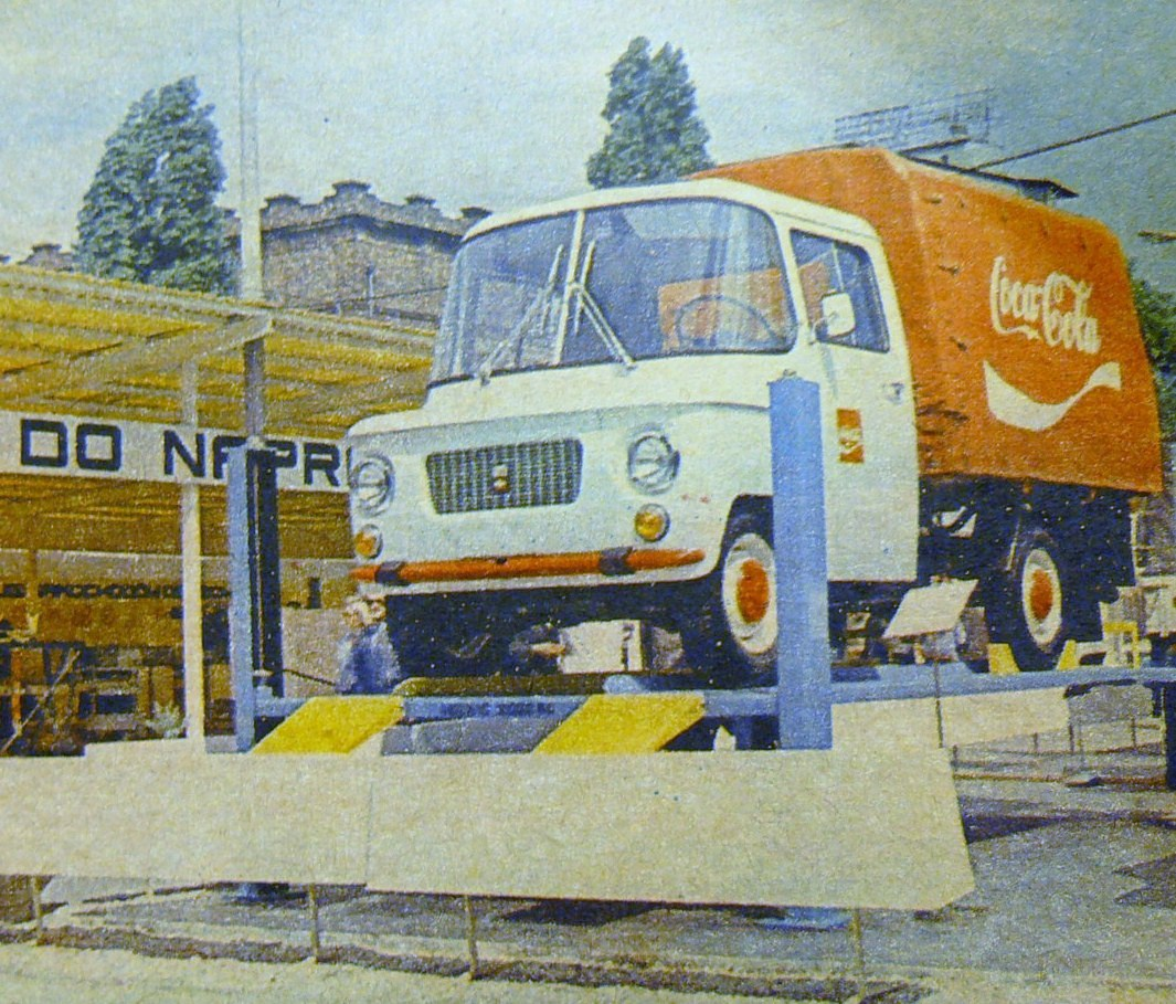 XLII MTP w Poznaniu w 1973 r. Nysa 522 do przewozu Coca Coli.